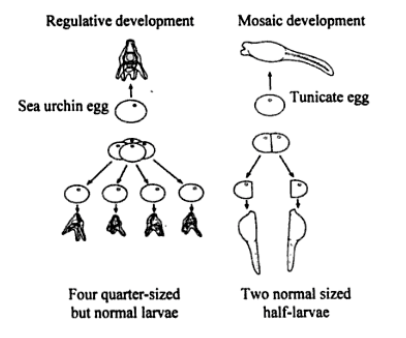 Schéma